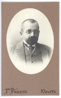 Mihhail Rostovtsev